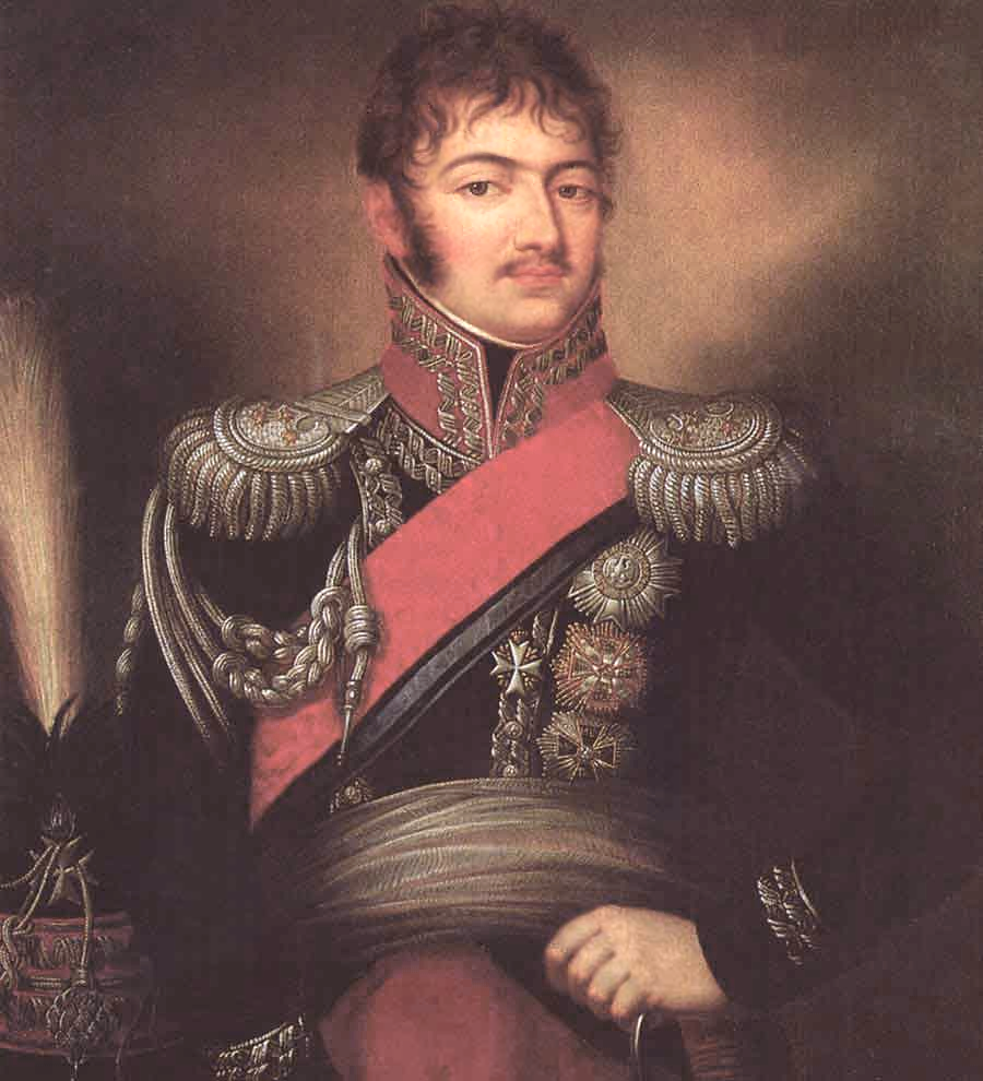 Prince Józef Poniatowski